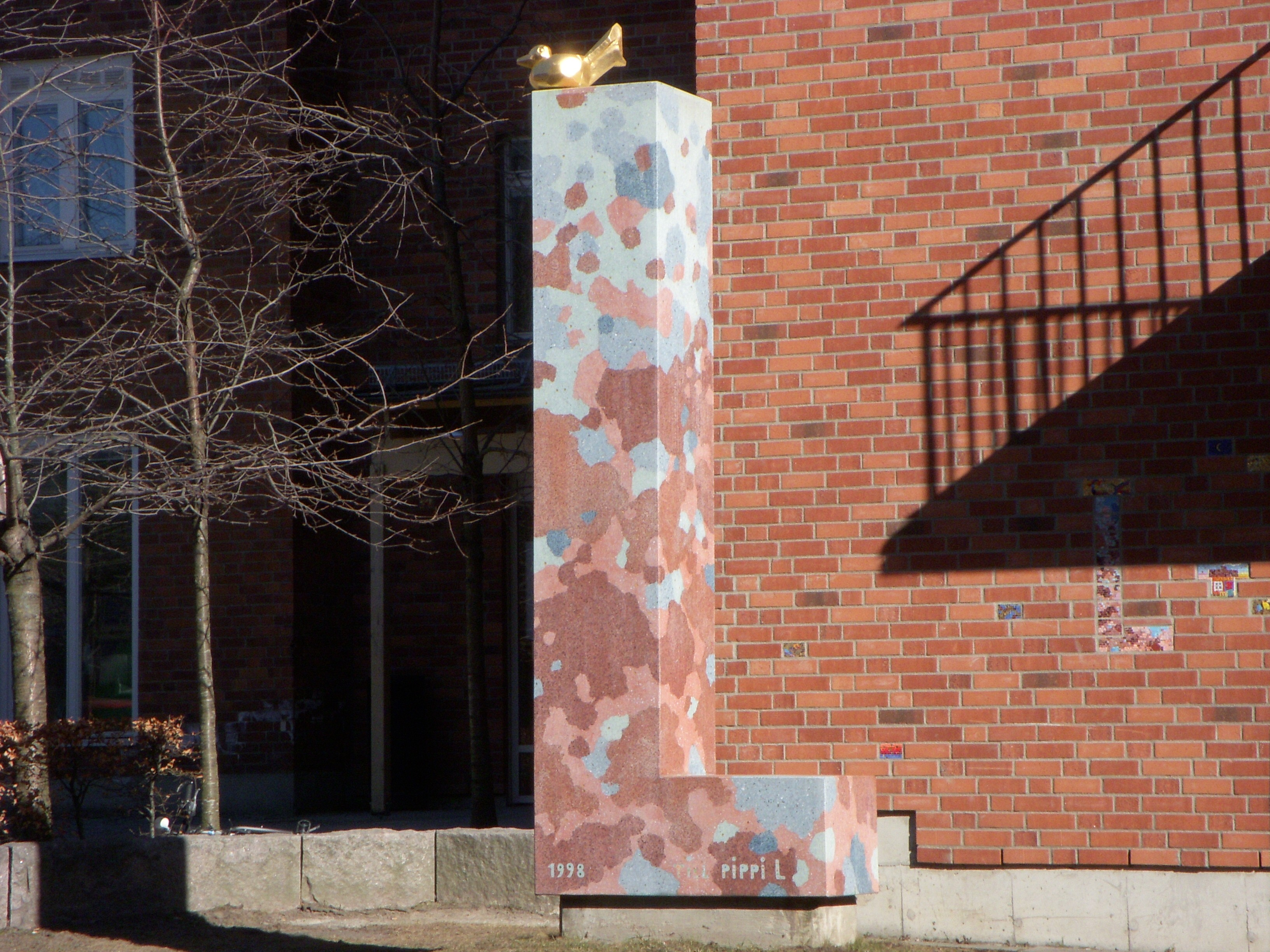 Skulptur av Enno Hallik utanför Astrid Lindgrens barnsjukhus i Stockholm "Pippi L" från 1998. Den föreställer ett stort "L" med en guldfågel på toppen.